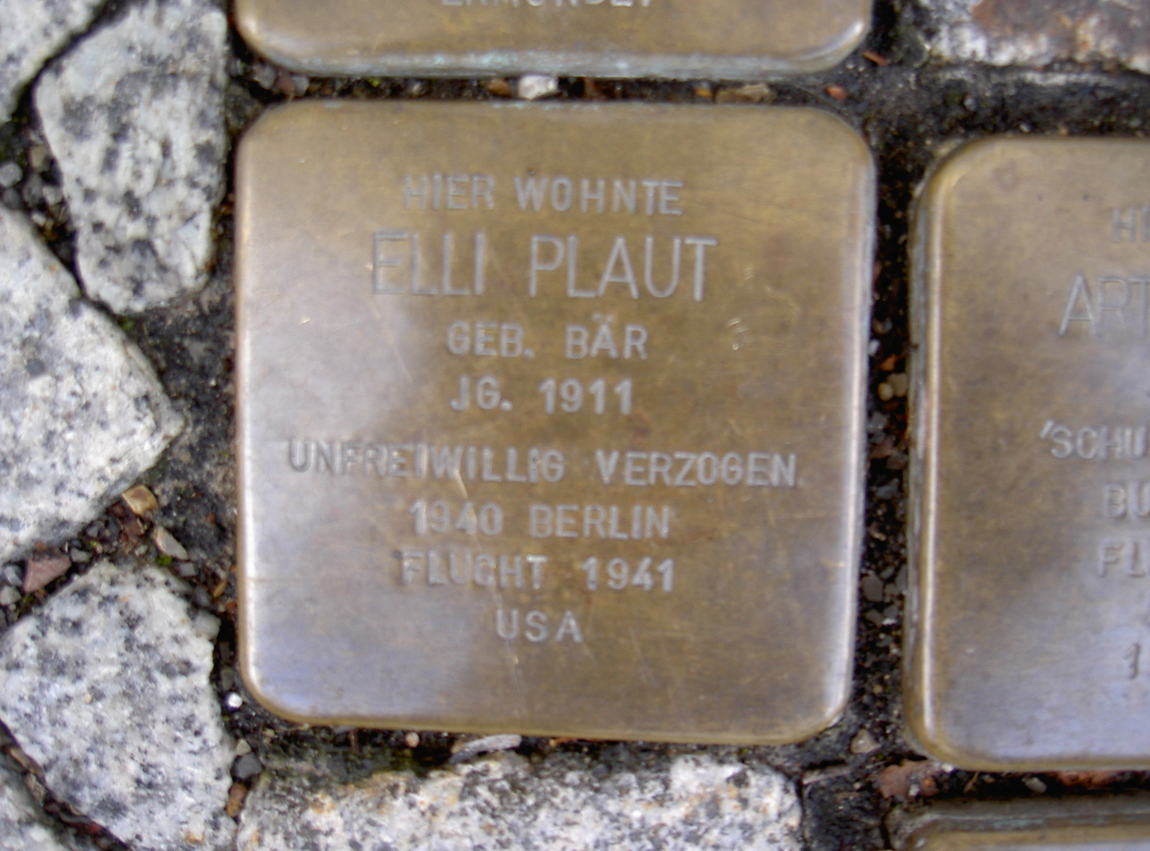 Stolperstein in Themar Markt 8 Plaut Elli